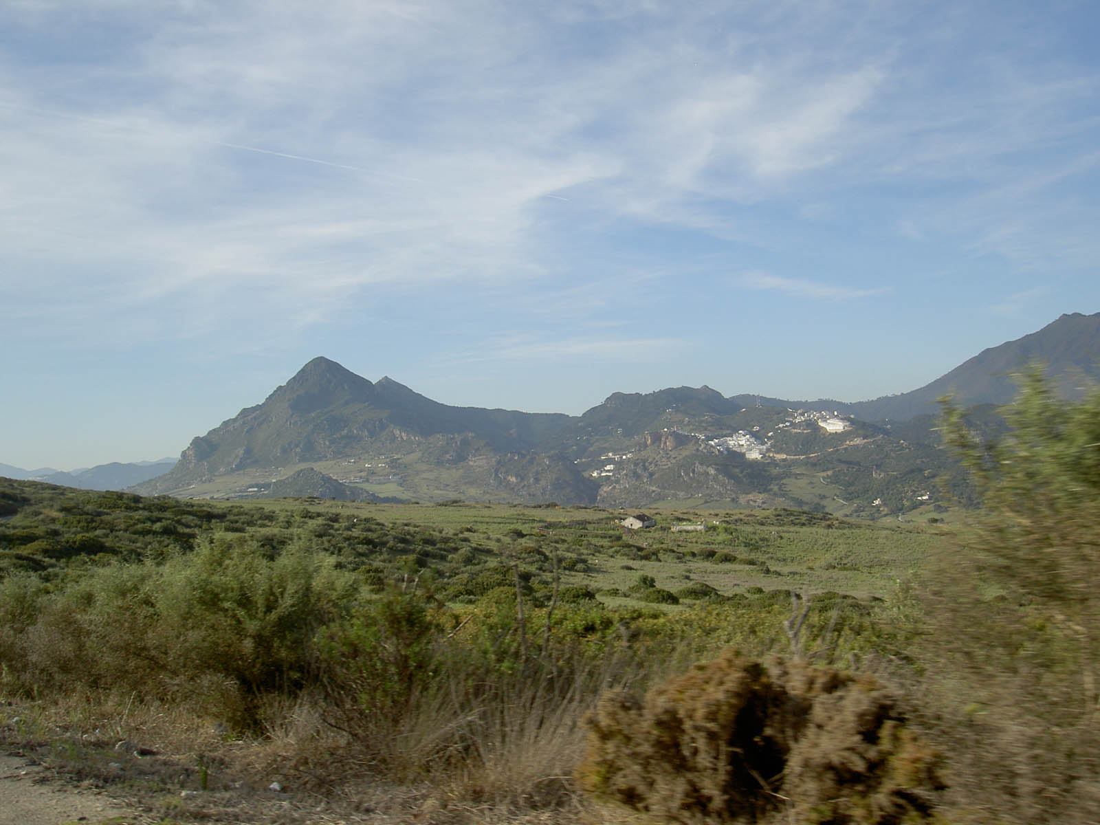 Sierra Crestellina, Casares